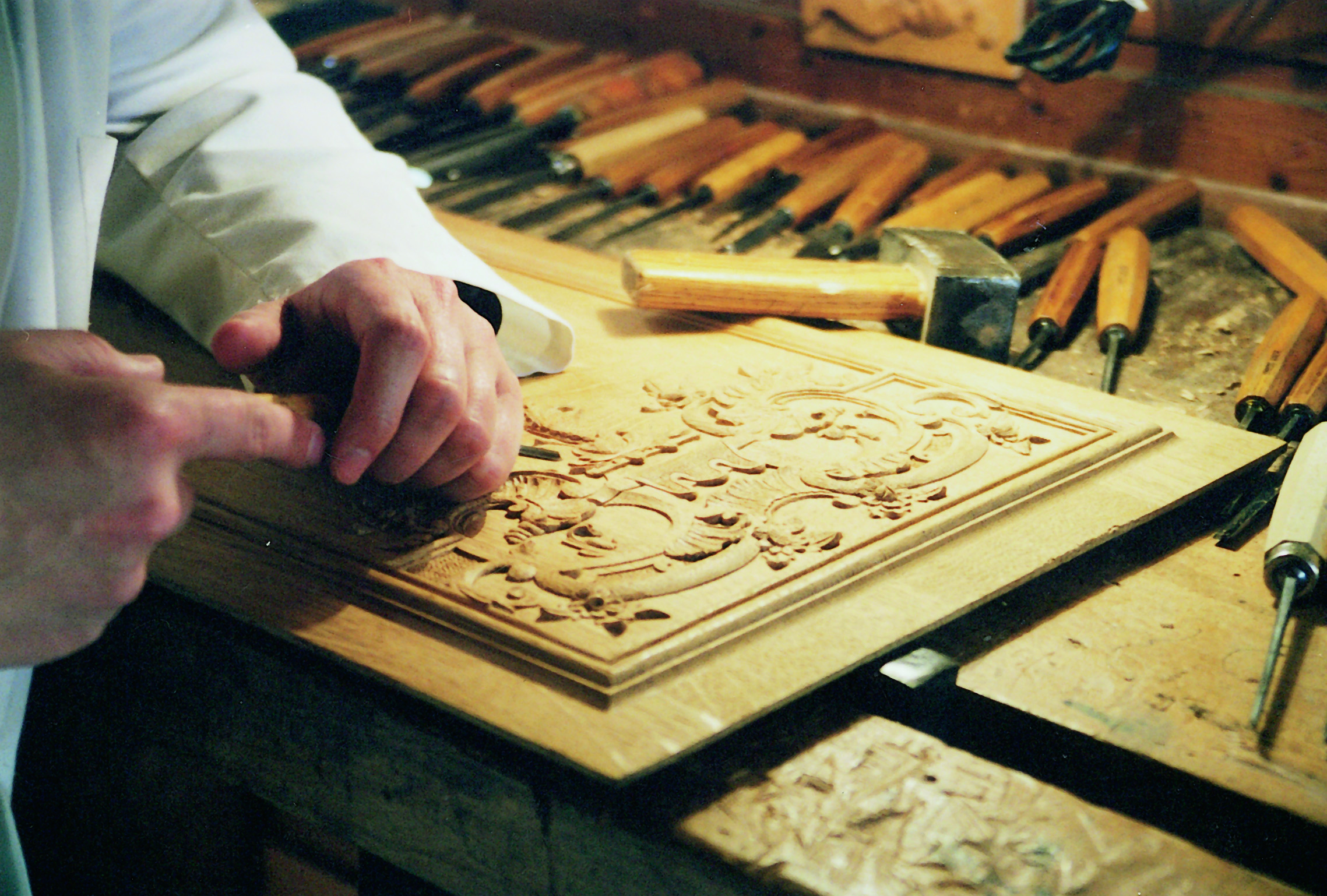 Houtornamentist Patrick Damiaens - Het maken van ornamenten in hout